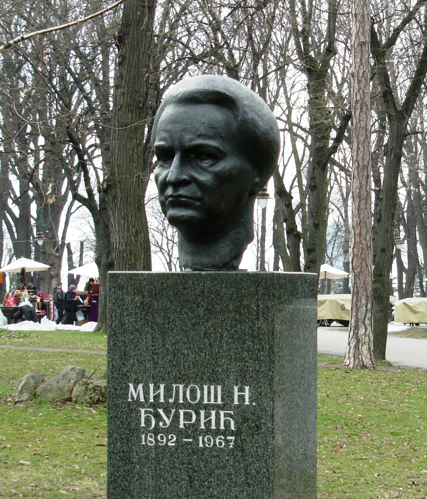 Miloš N. Đurić, bista na Kalimegdanu, Beograd. Slikao Goldfinger